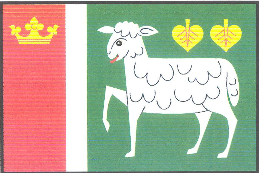 Vlajka obce Vysoký Újezd